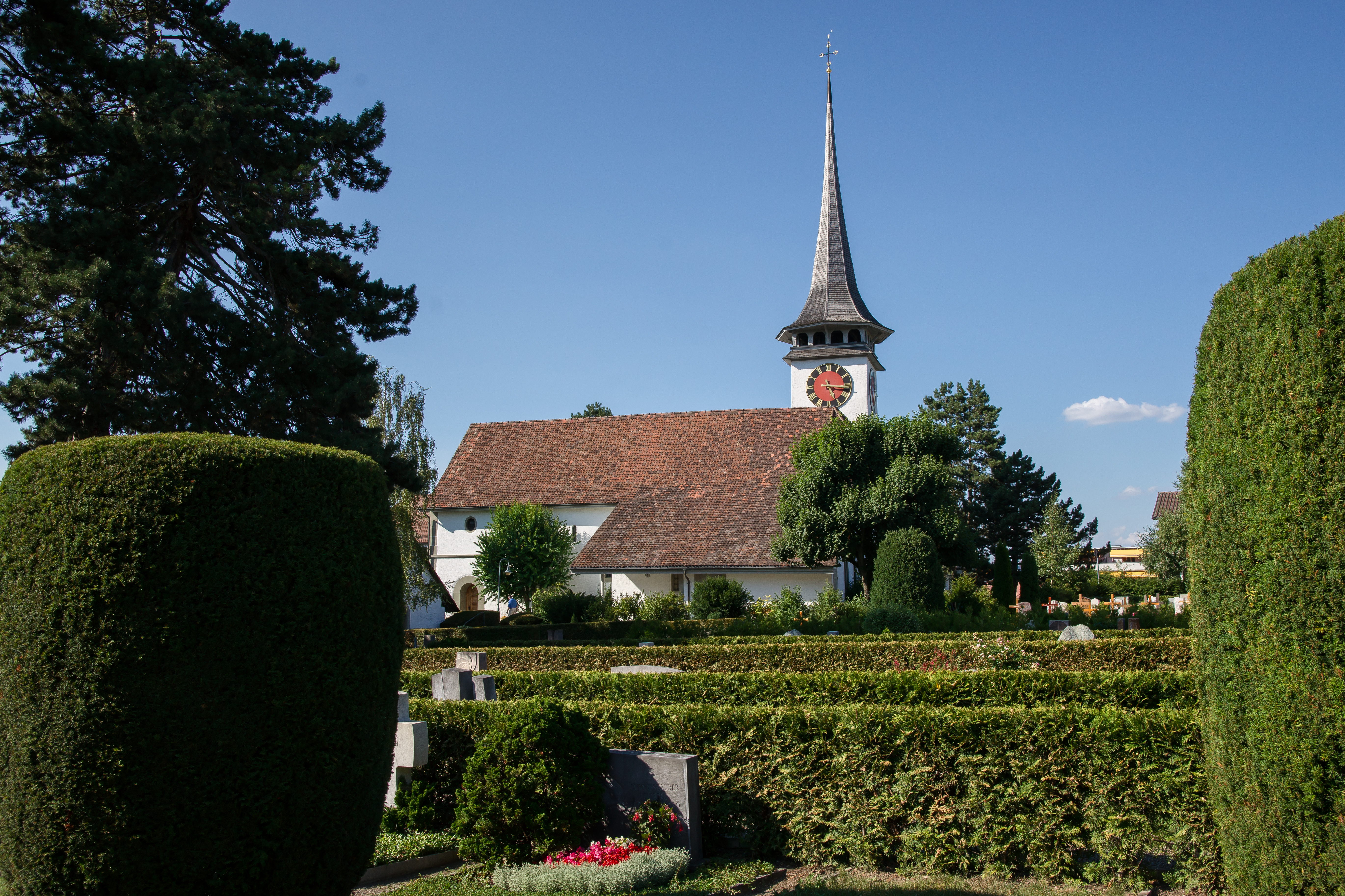 Reformierte Kirche